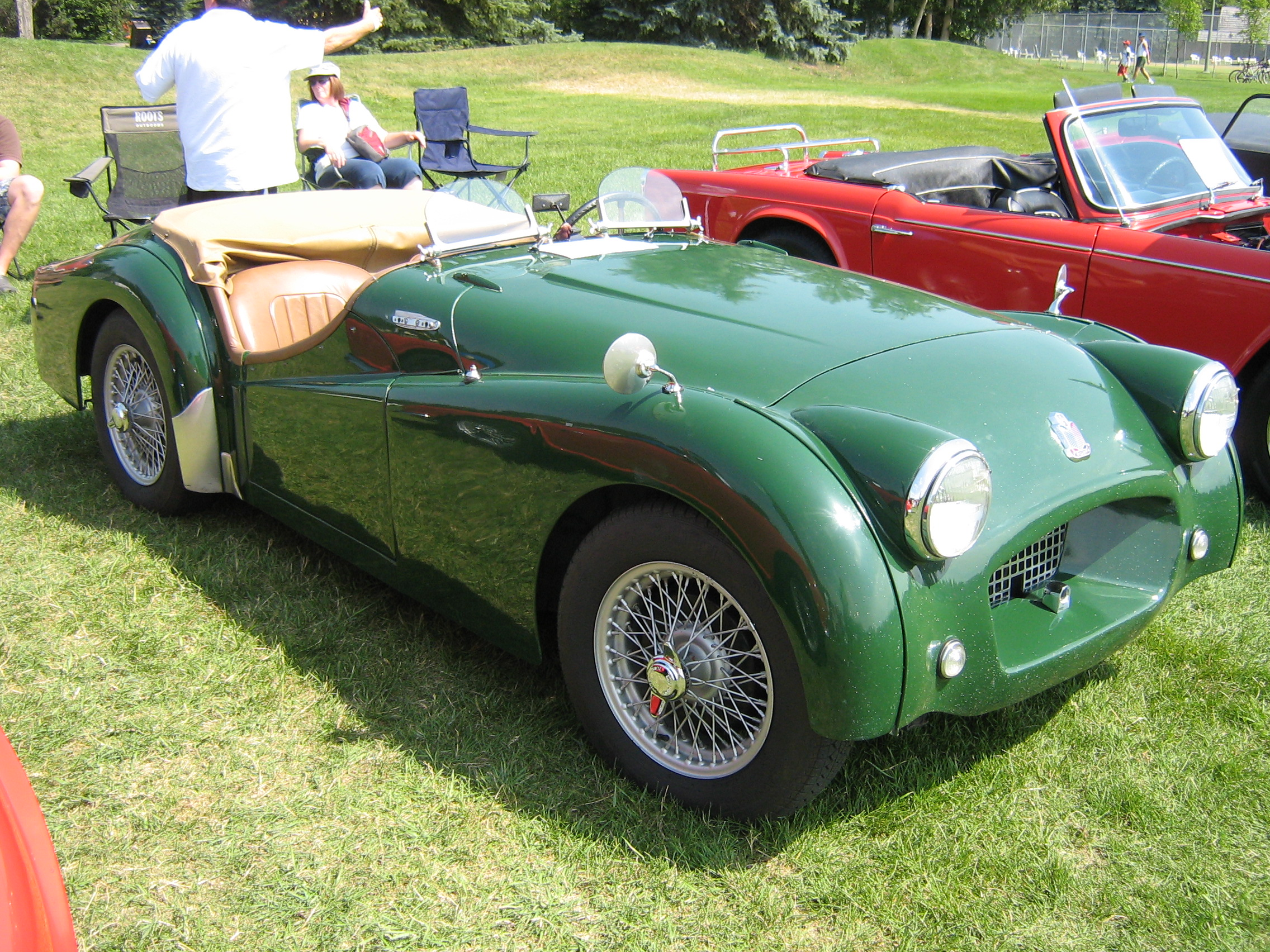 Triumph TR2